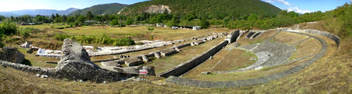 Panoramica del teatro romano di Amiternum situato nell'omonima area archeologica nei pressi di San Vittorino (L'Aquila)